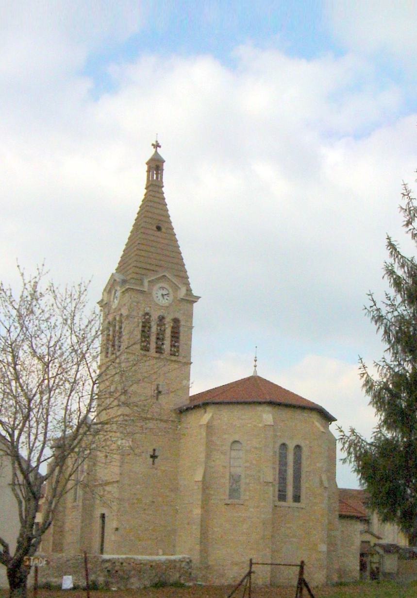 église d'Optevoz